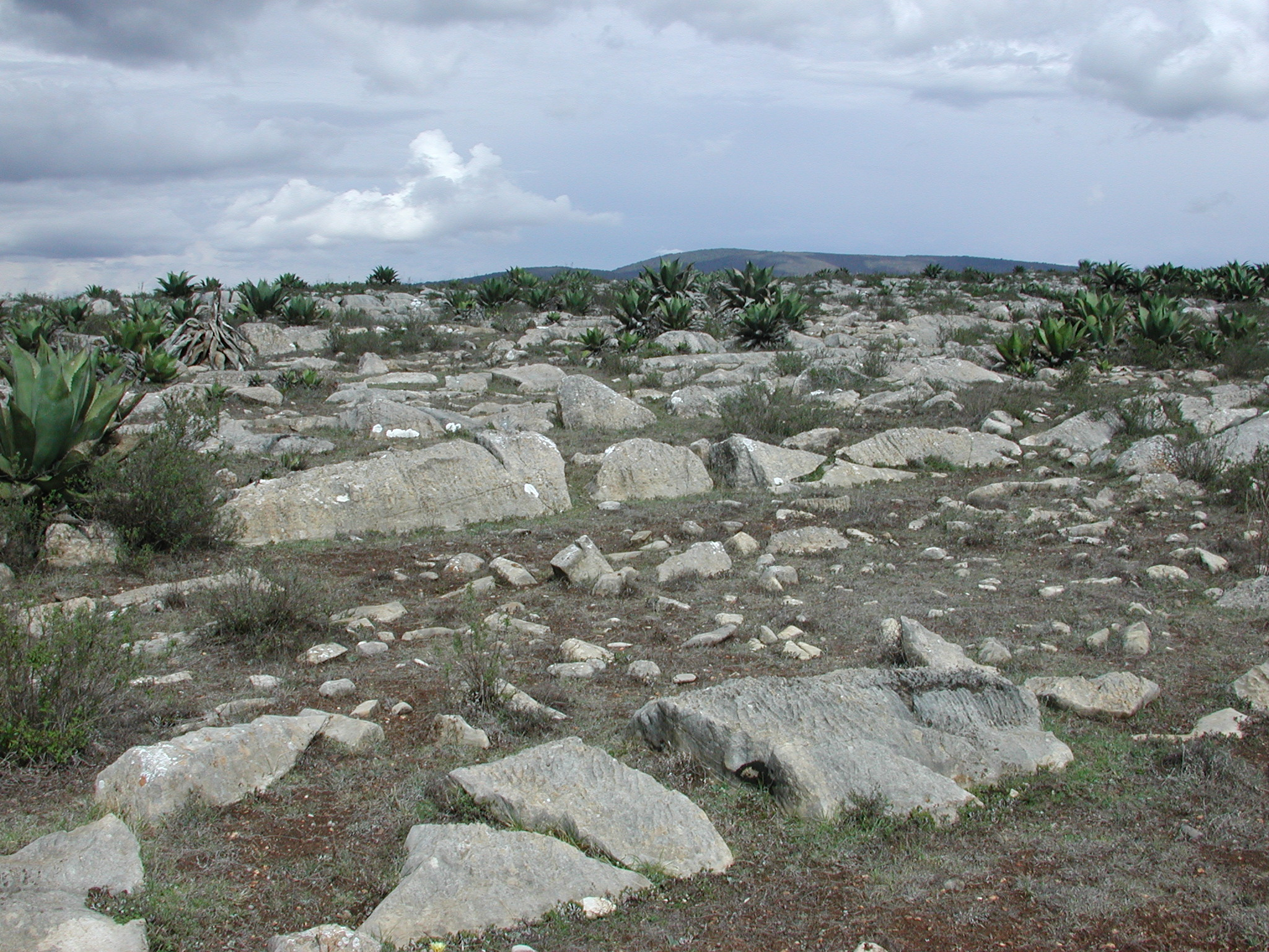 Habitat of Mammillaria kraehenbuehlii